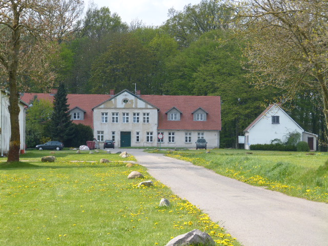 Pobłocie Wielkie, dwór